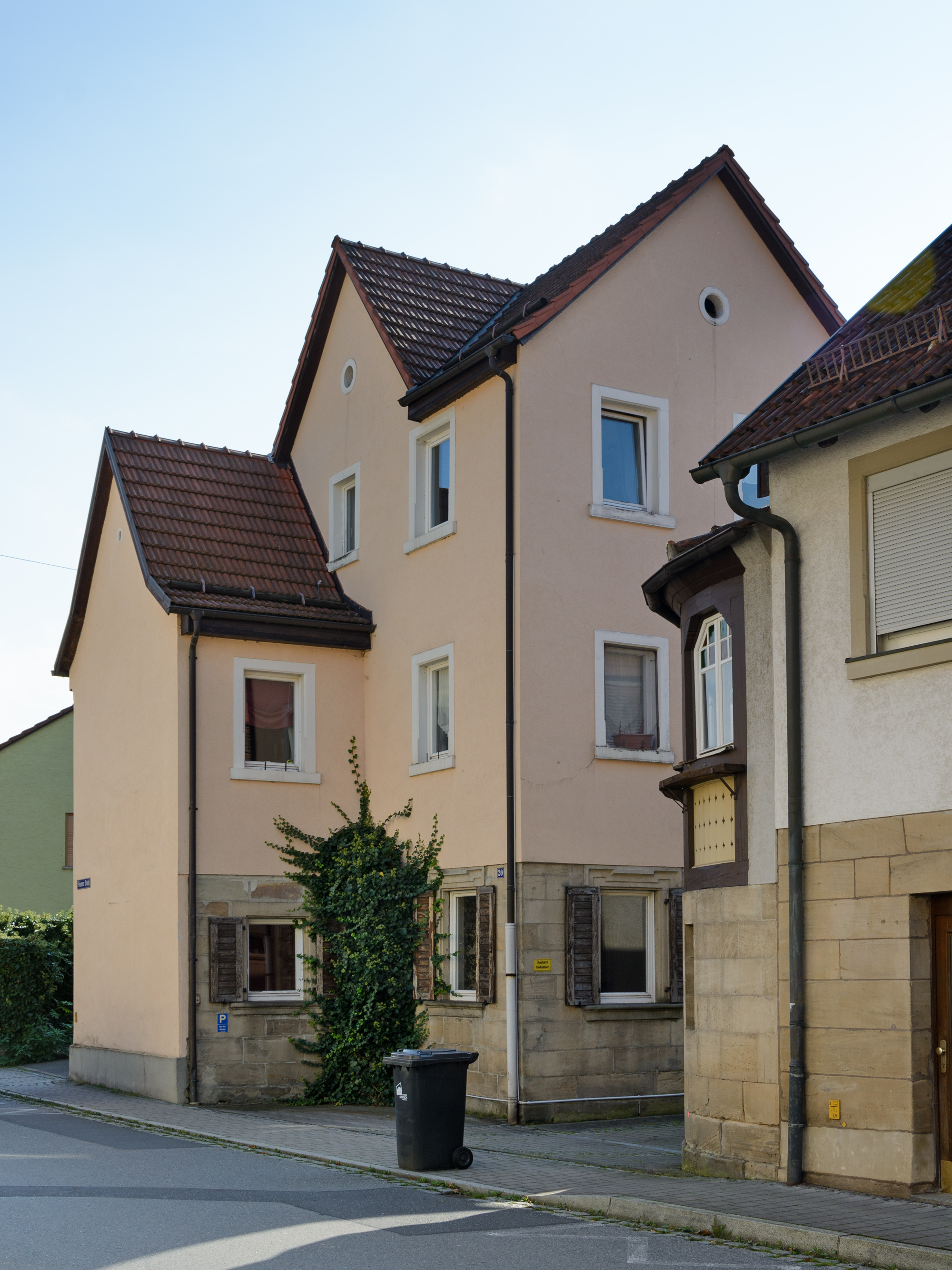 Gebäude Friesener Straße 20 in Kronach.